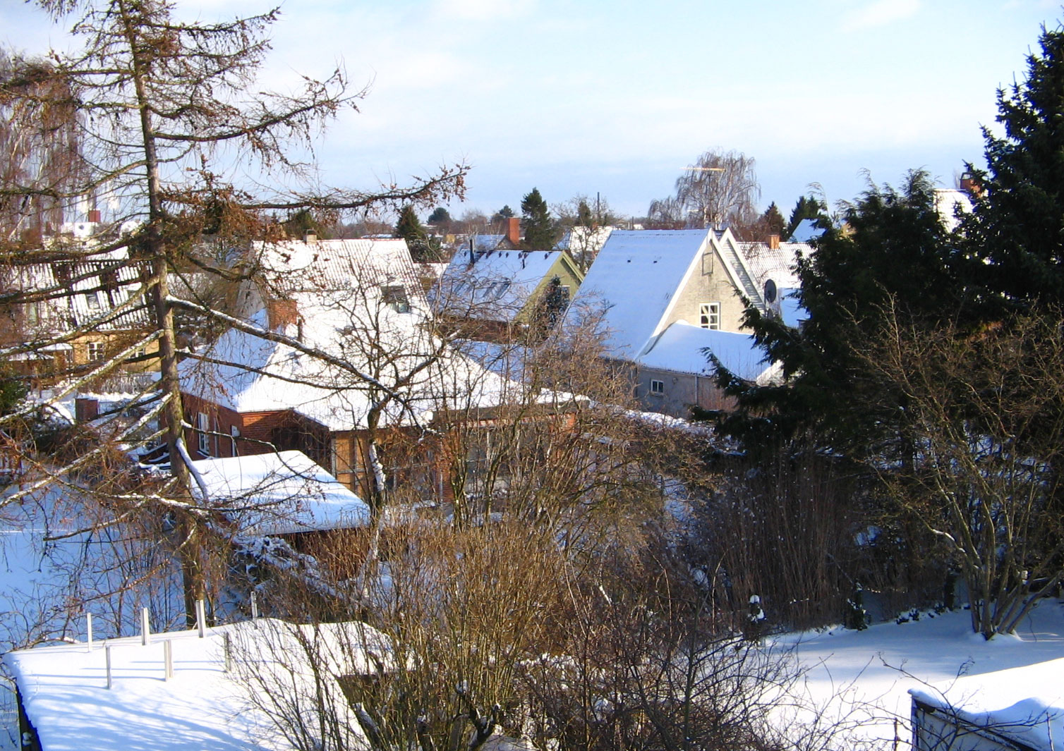 Udsnit af Hendriksholm-kvarteret i den sydlige del af Rødovre Kommune.